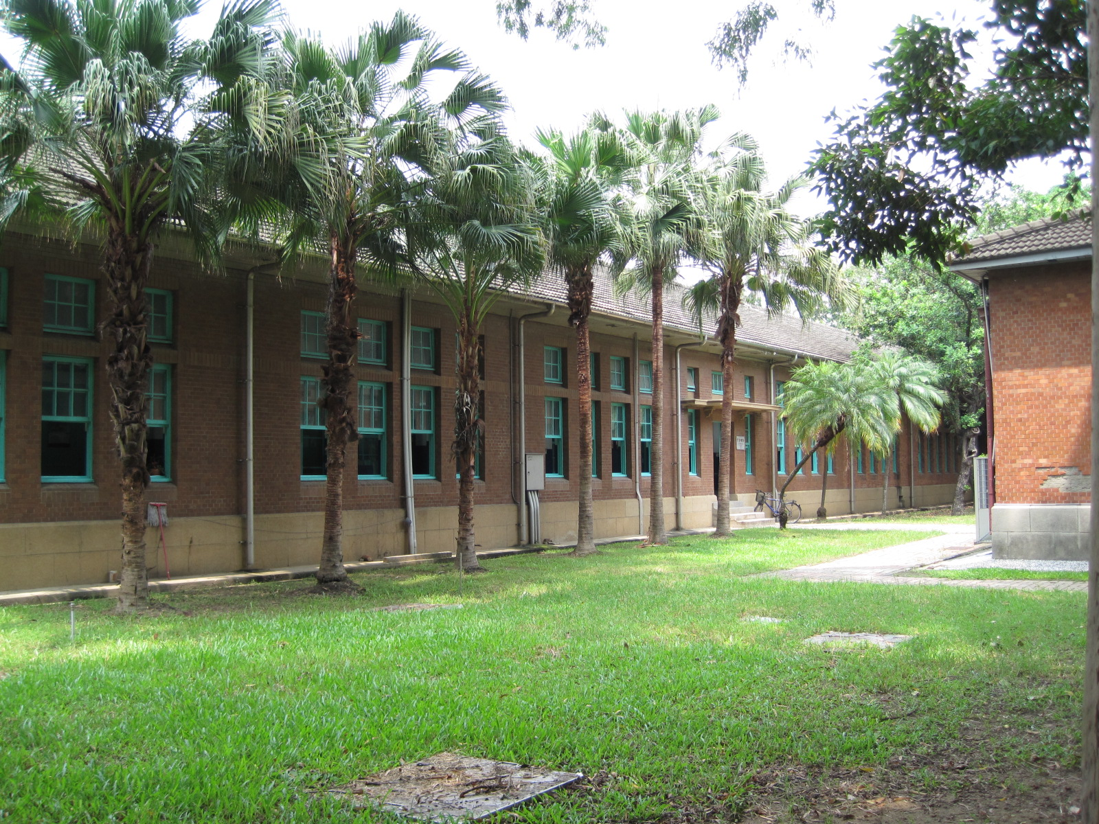 成功大學物理系館